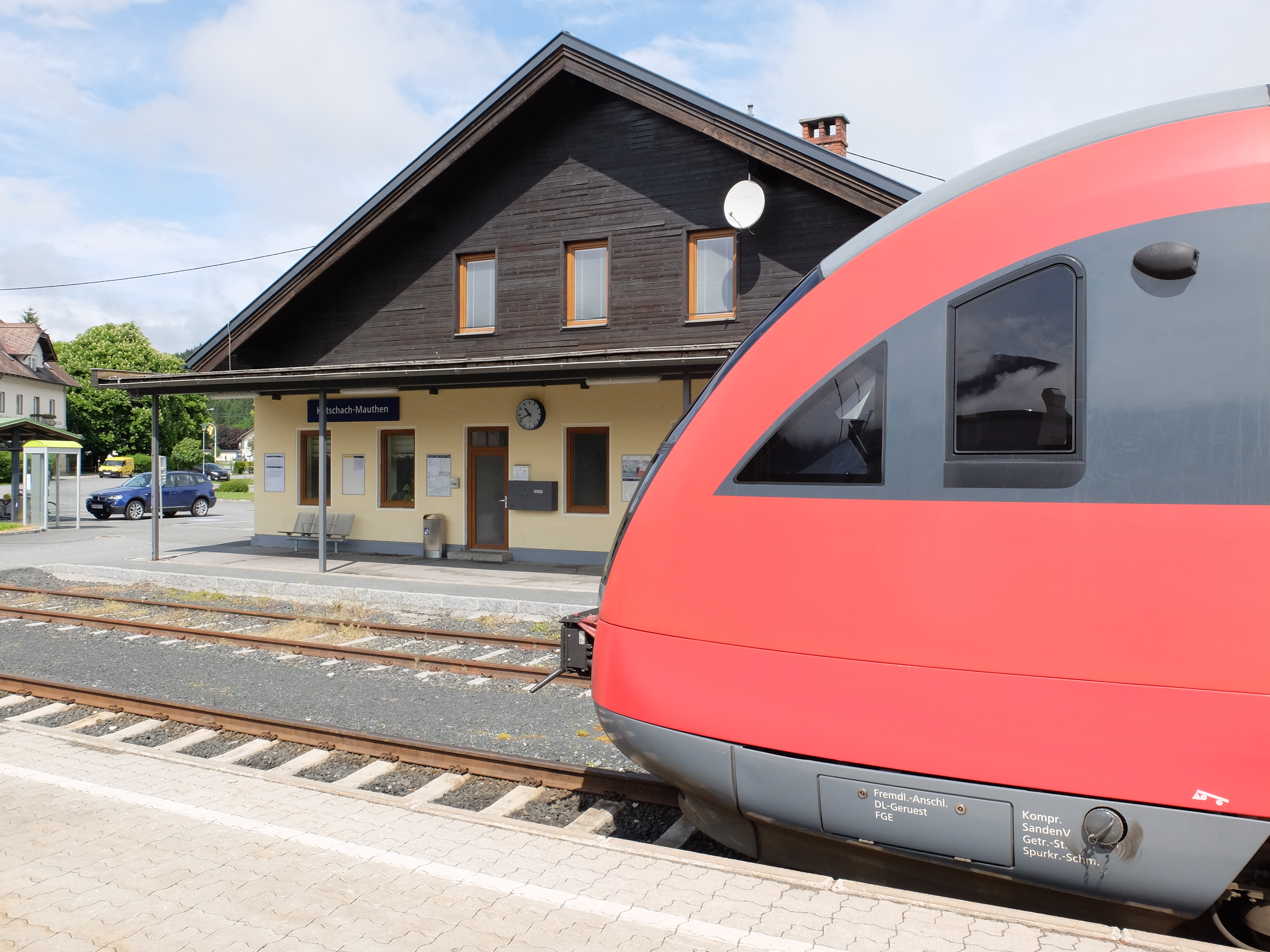 Bahnhof Kötschach-Mauthen